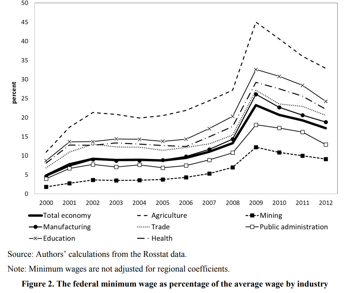 Индекс Кейтца по отраслям (отношение федерального МРОТ к средней зарплате в отрасли) в России